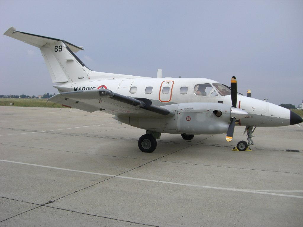 Embraer EMB-121 Xingu de la Marine